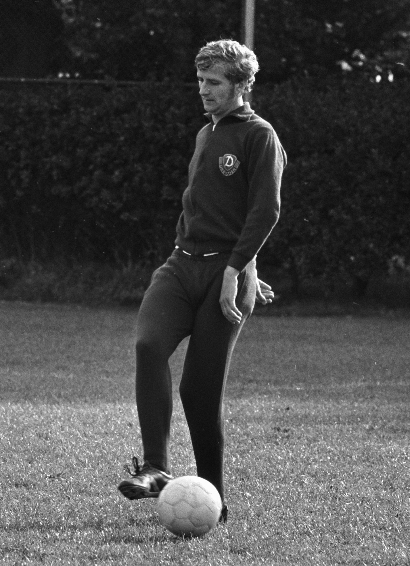 Collectie / Archief : Fotocollectie Anefo Reportage / Serie : [ onbekend ] Beschrijving : Dynamo Dresden traint op Ajax veld Amsterdam Datum : 13 september 1971 Locatie : Amsterdam, Noord-Holland Trefwoorden : sport, trainingen, voetbal Persoonsnaam : Dynamo Dresden, Veld Ajax Instellingsnaam : AJAX Fotograaf : Peters, Hans / Anefo Auteursrechthebbende : Nationaal Archief Materiaalsoort : Negatief (zwart/wit) Nummer archiefinventaris : bekijk toegang 2.24.01.05 Bestanddeelnummer : 924-9307